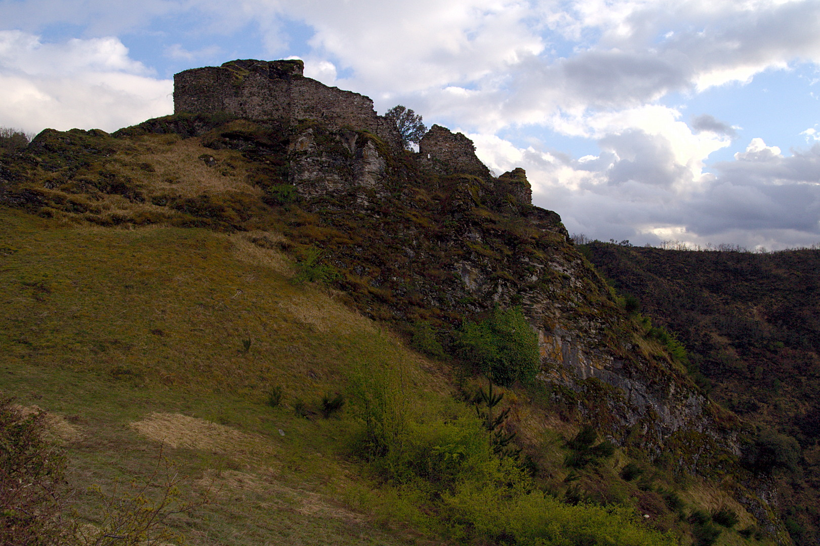 Castillo de Corbedo